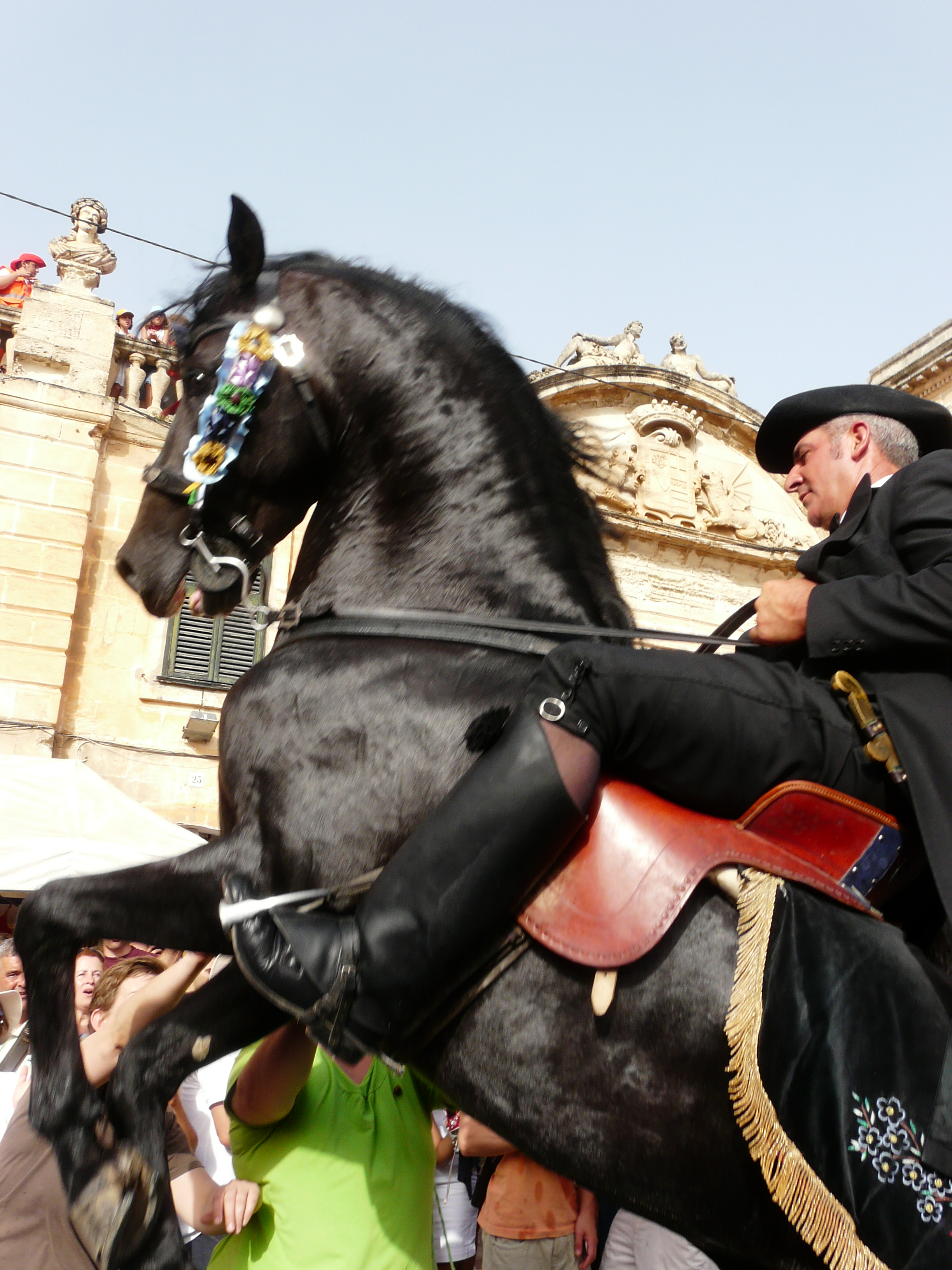 Cavall menorquí